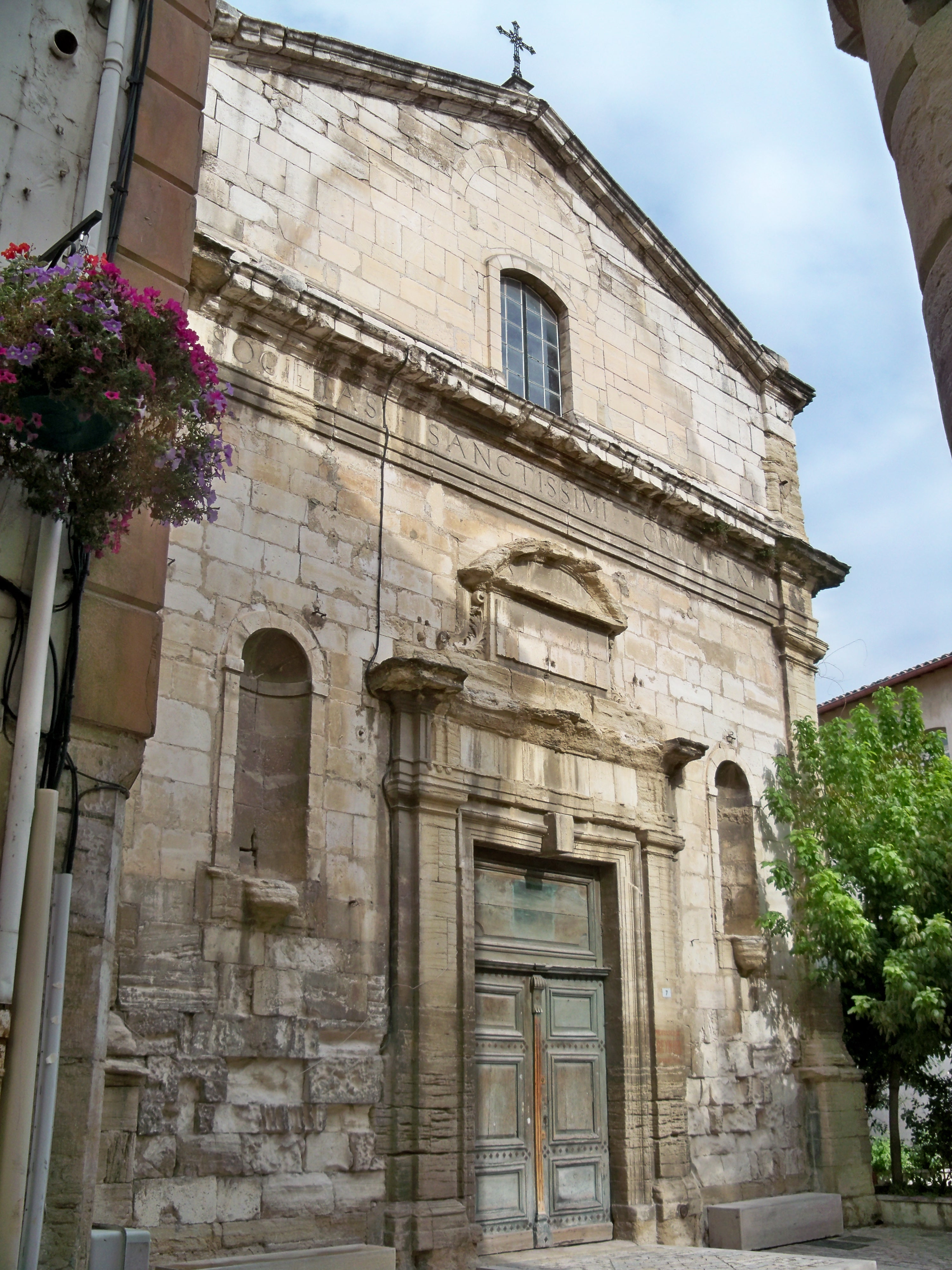 Chapelle du Très Saint Crusifix à Carpentras (ou chapelle des Pénitants Noirs), Vaucluse, France